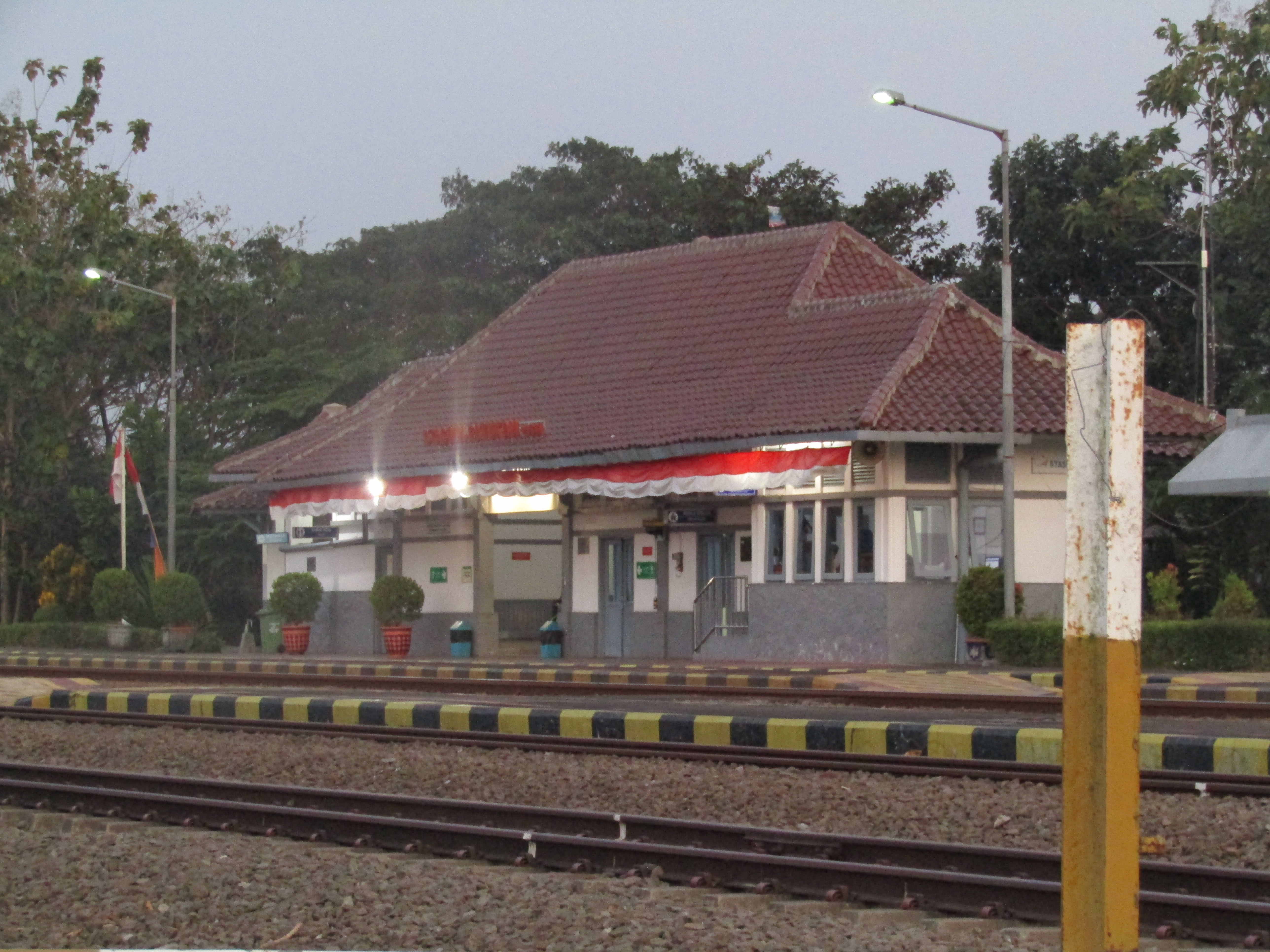 Bangunan Stasiun Patukan, 2020